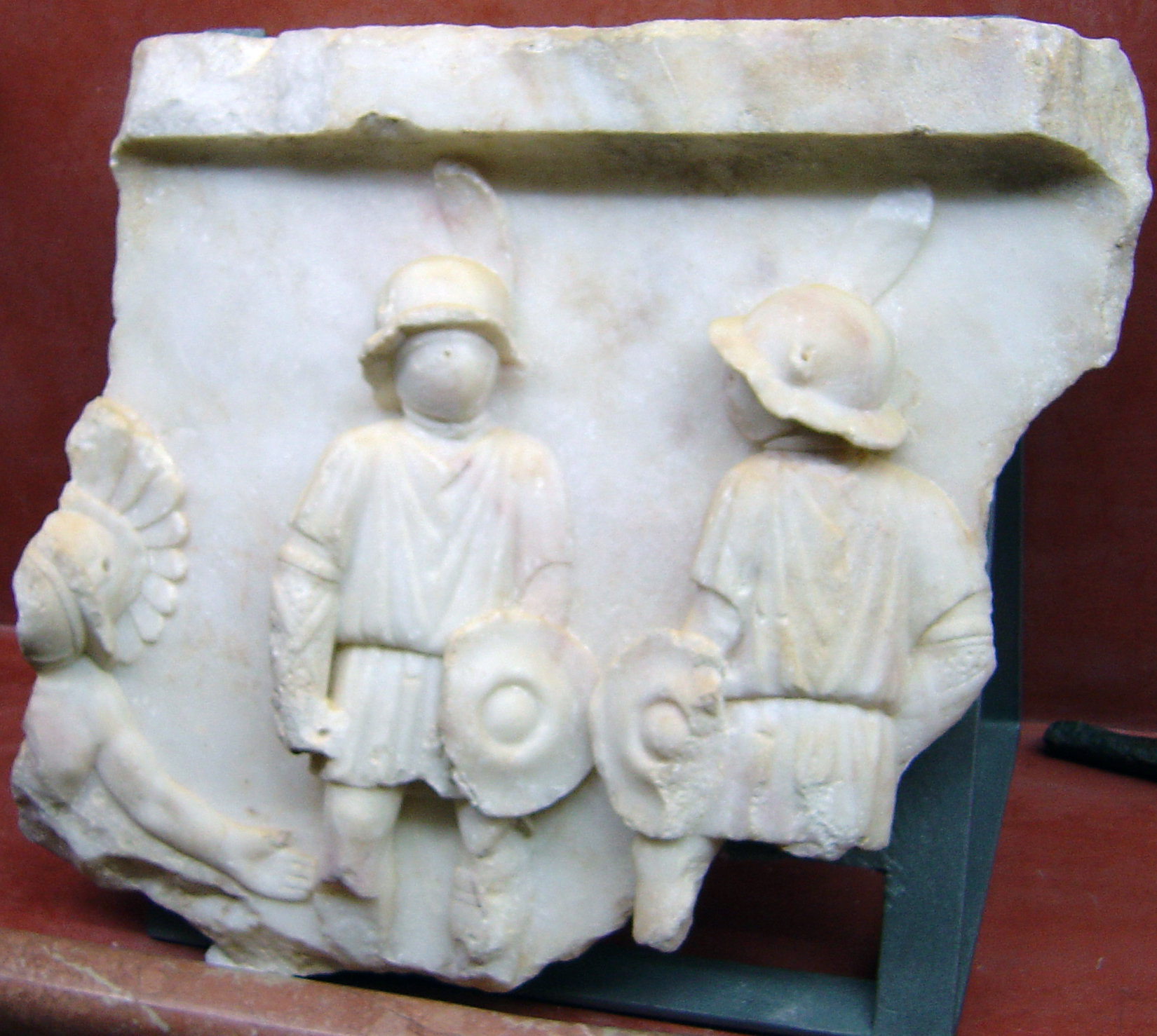 Frontón con escena de gladiadores procedente del Anfiteatro romano de Emerita Augusta (Mérida, Badajoz, España)